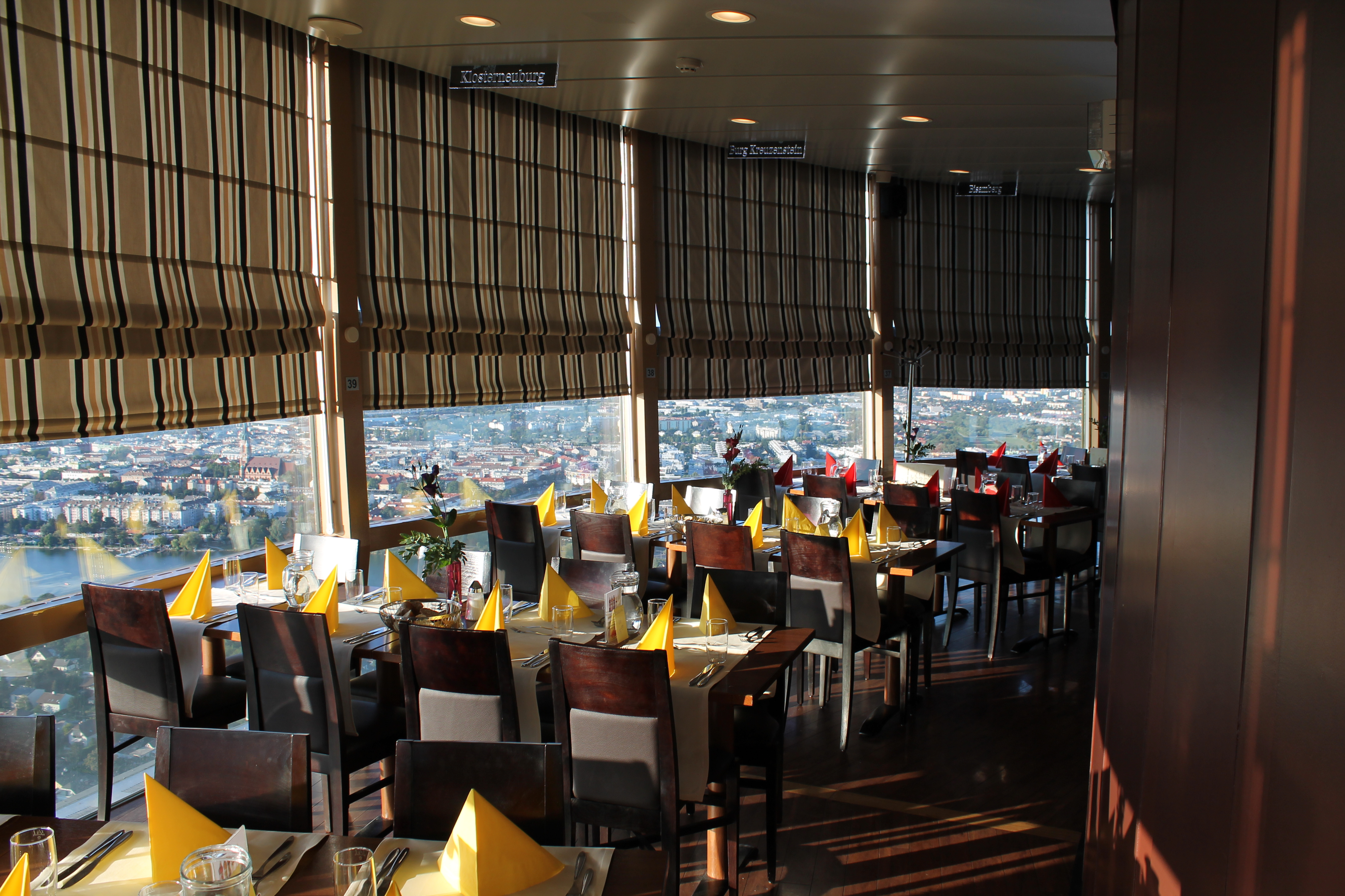 Donauturm Café